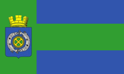 Флаг города Щучье